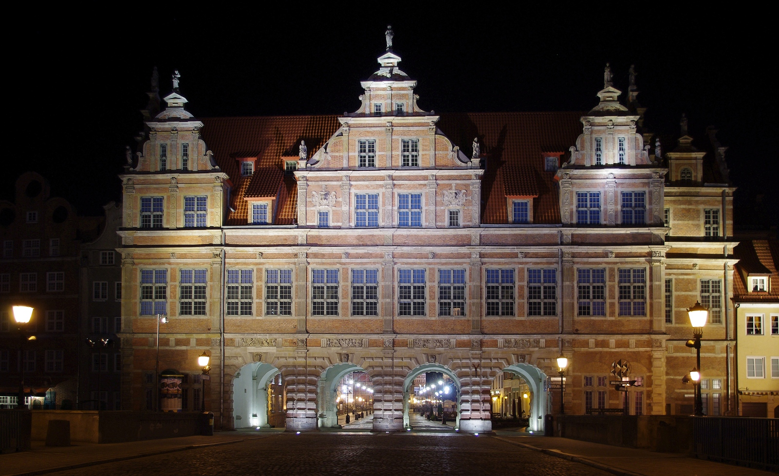 Brama Zielona, ul. Długi Targ 24, Gdańsk.